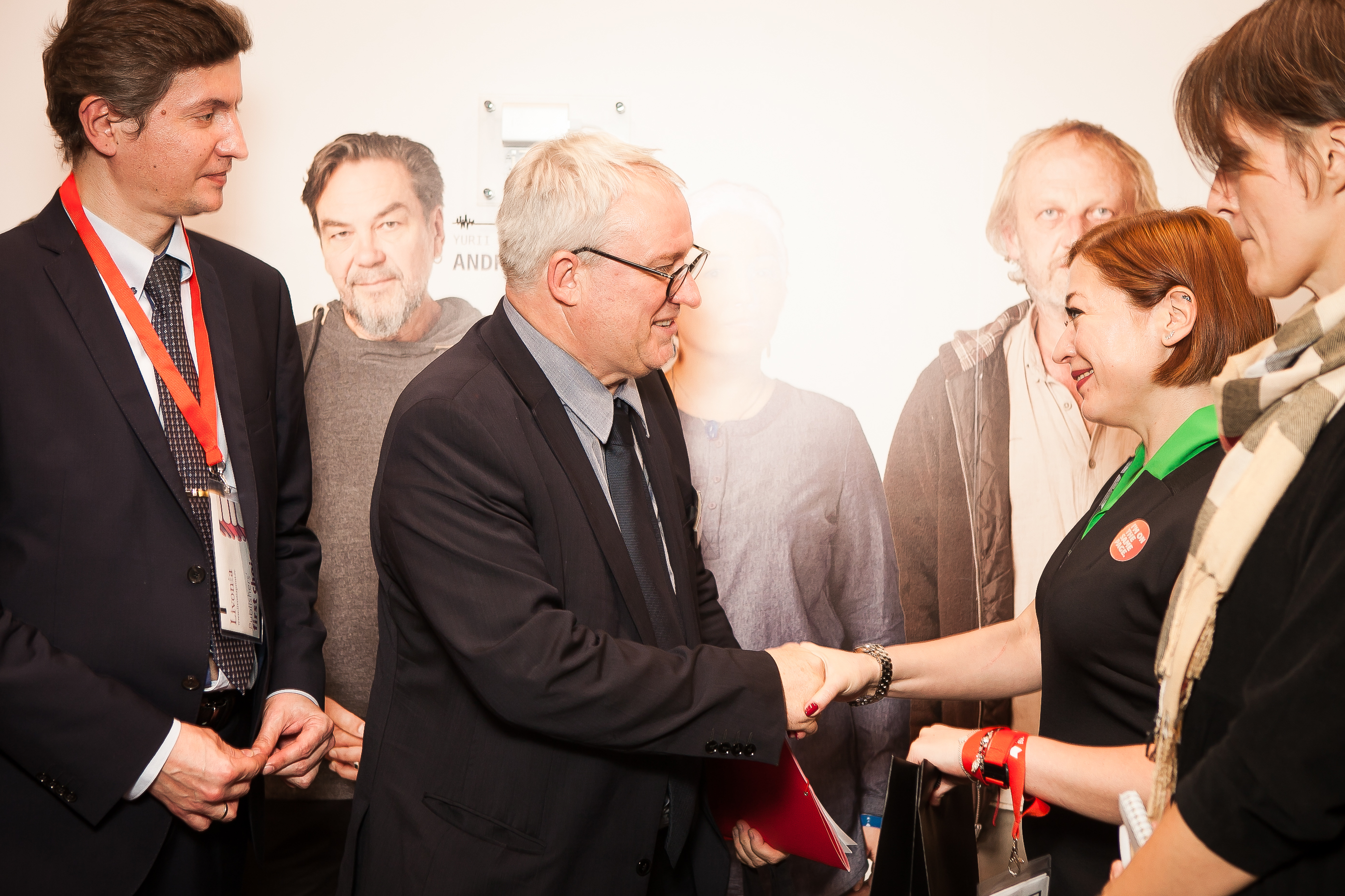 Віце-президент Франкфуртського книжкового ярмарку Тобіас Фосс на українському стенді